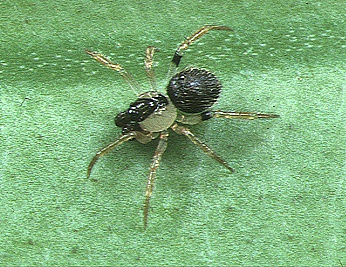 male Dipoena flavomarginata from Okinawa.